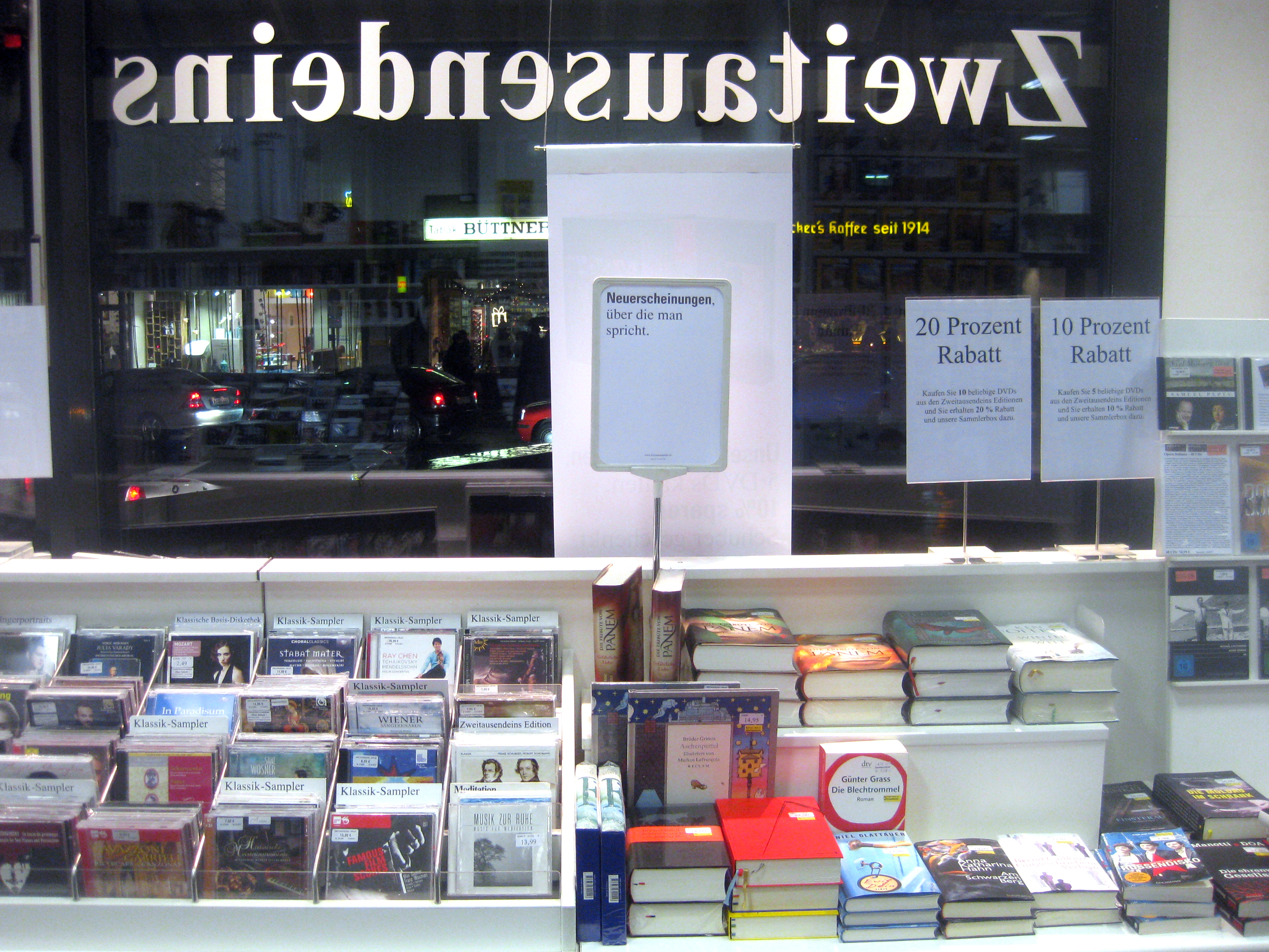 Zweitausendeins-Filiale in Frankfurt, 22.12.2012